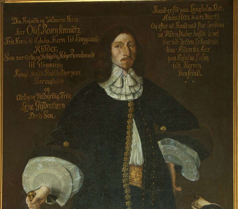 Epitafie af Oluf Rosenkrantz fra Sæby kirke. Se flere på